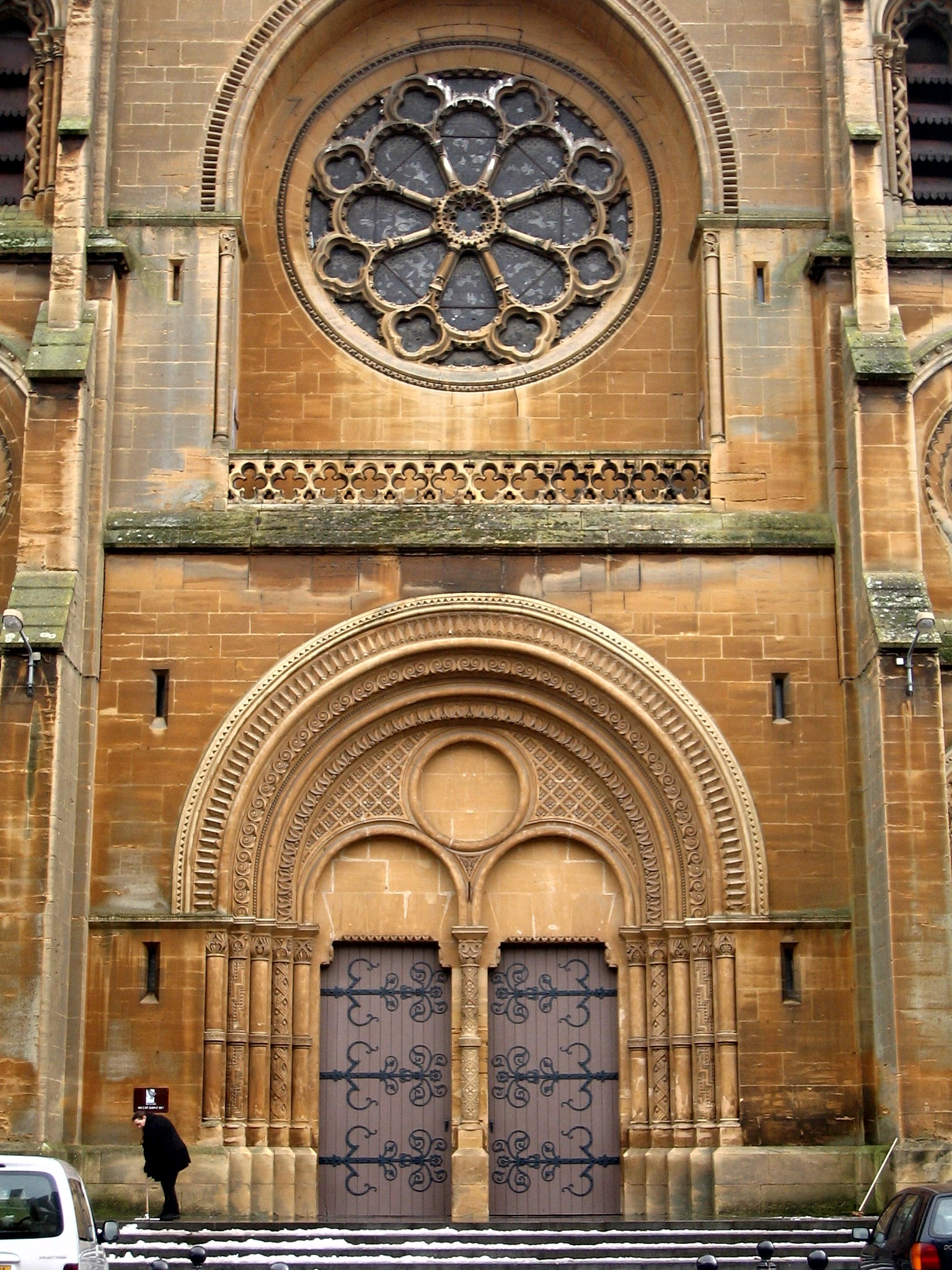 Eglise Saint Rémi façade Charleville-Mézières